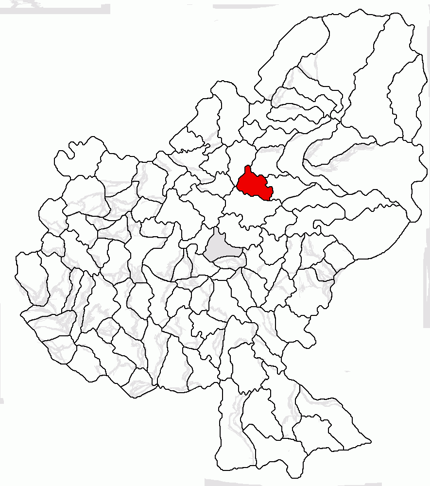 Categorie:Hărţi ale judeţului Mureş